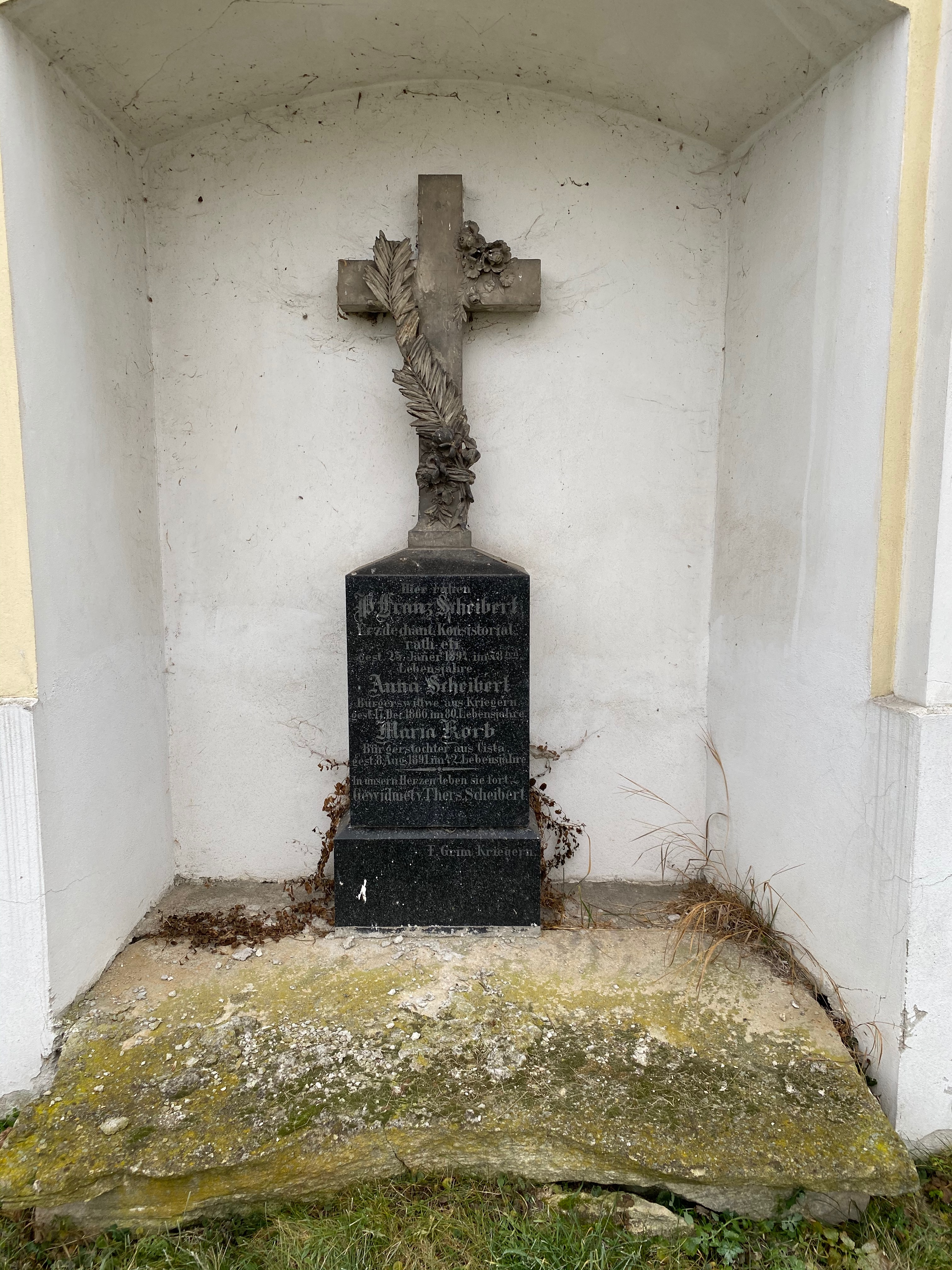 R.D. Franz Scheibert - kněžský hrob v Libočanech